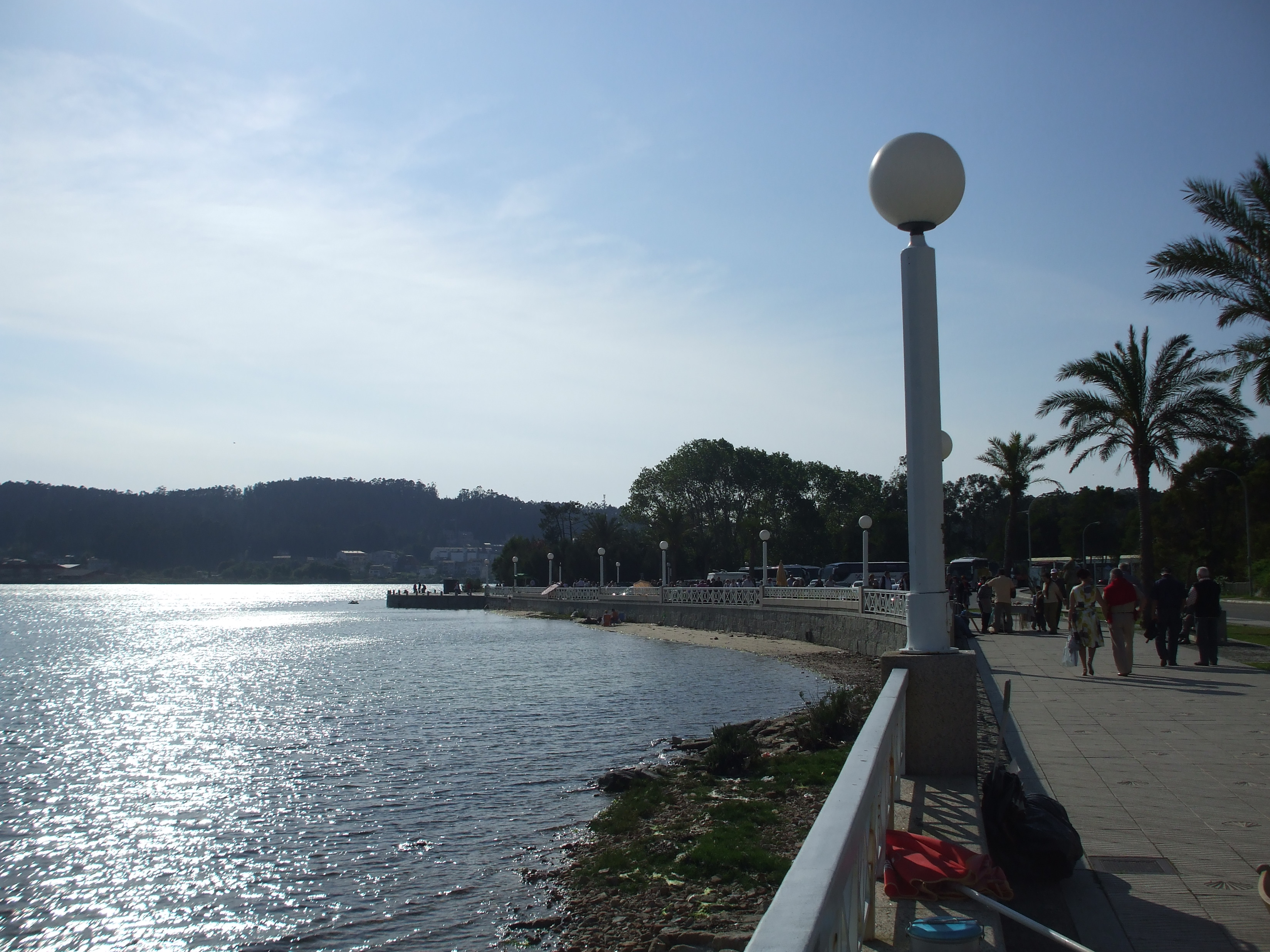 Illa da Toxa, O Grove, Galicia (Spain)